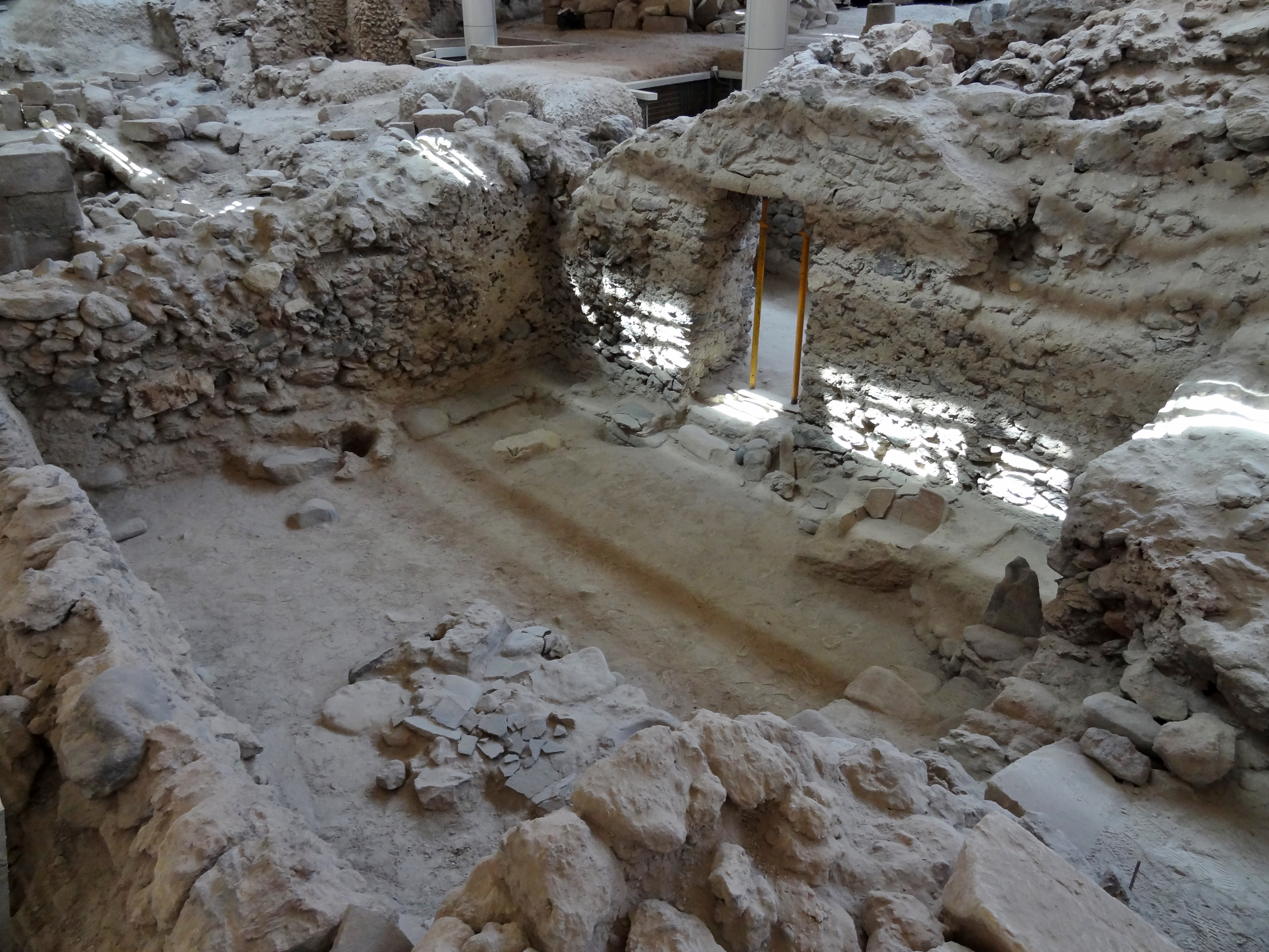 Ausgrabungsstätte von Akrotiri auf Santorin, Kykladen, Griechenland